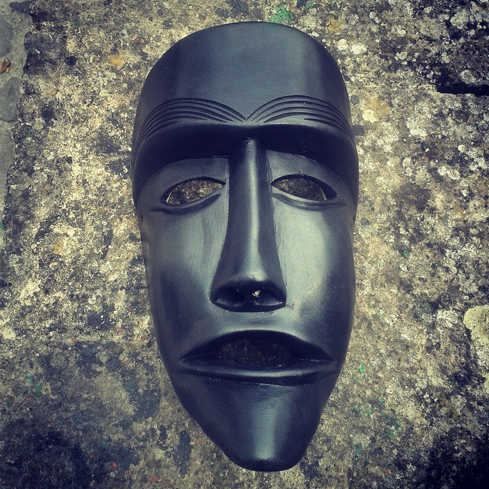 Maschera de Sa Filonzana, tipica di Ottana